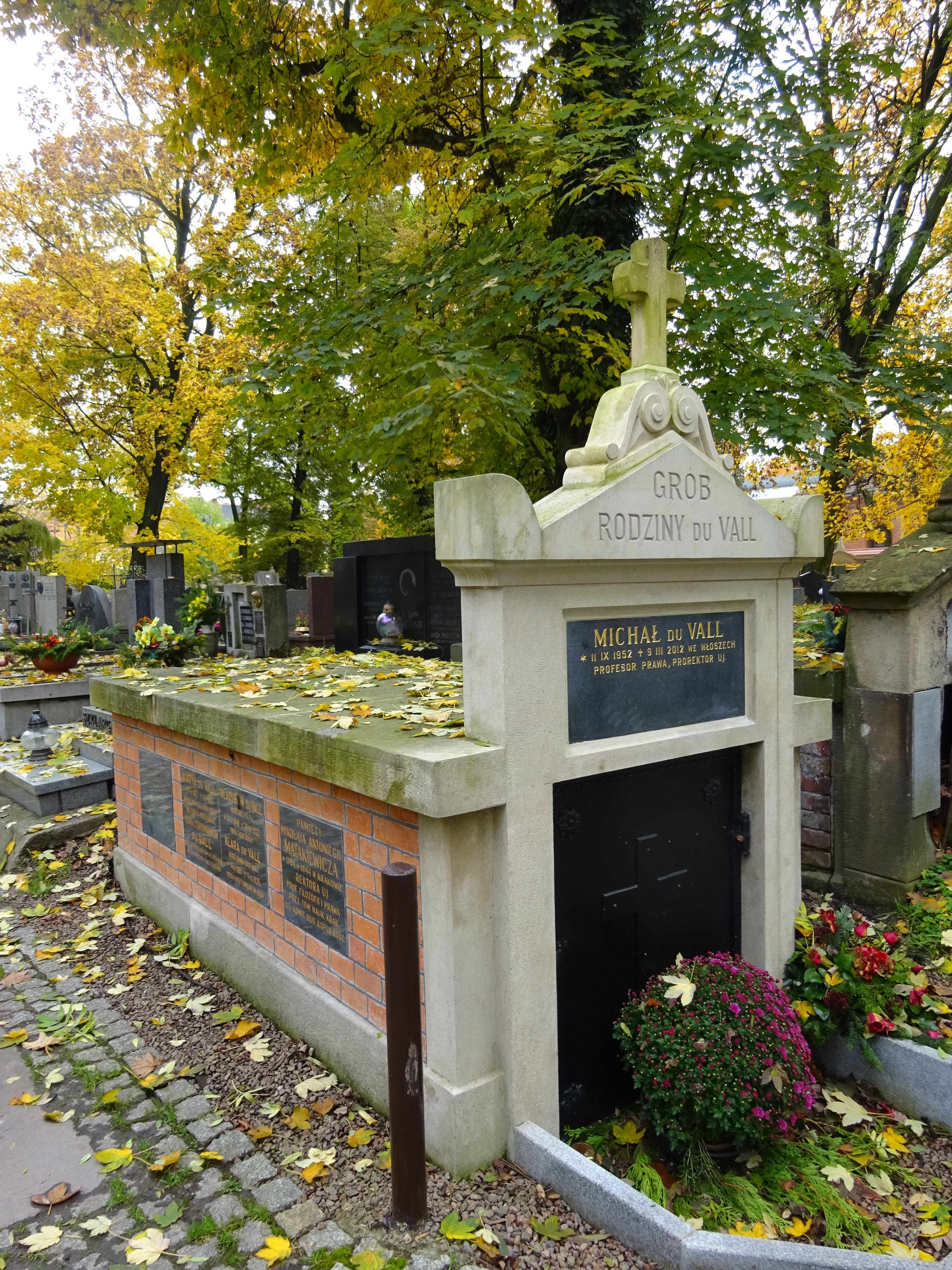 Grobowiec Michała Du Valla na Cmentarzu Rakowickim w Krakowie.